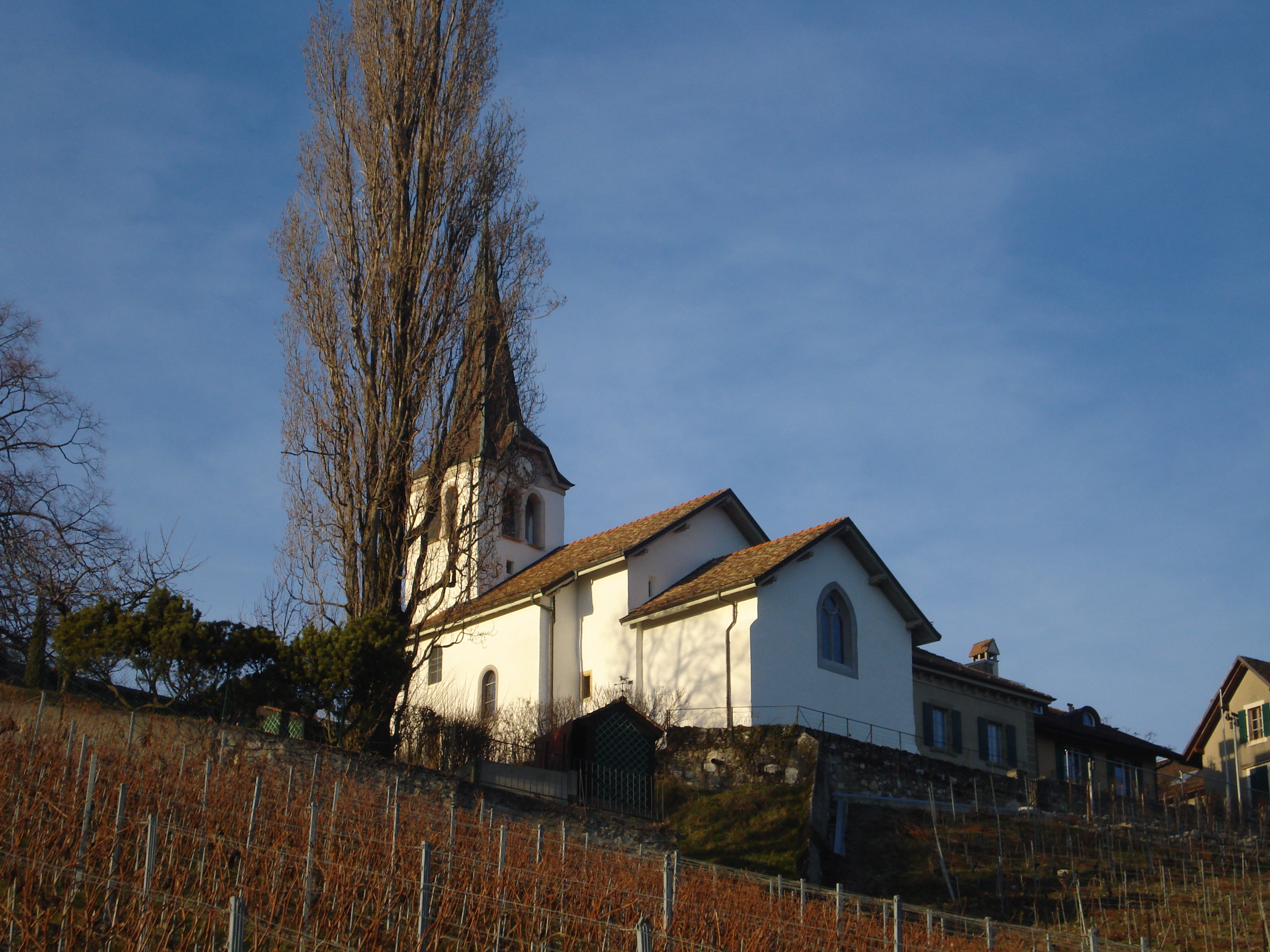 Église Saint-Sulpice de Féchy (Suisse).